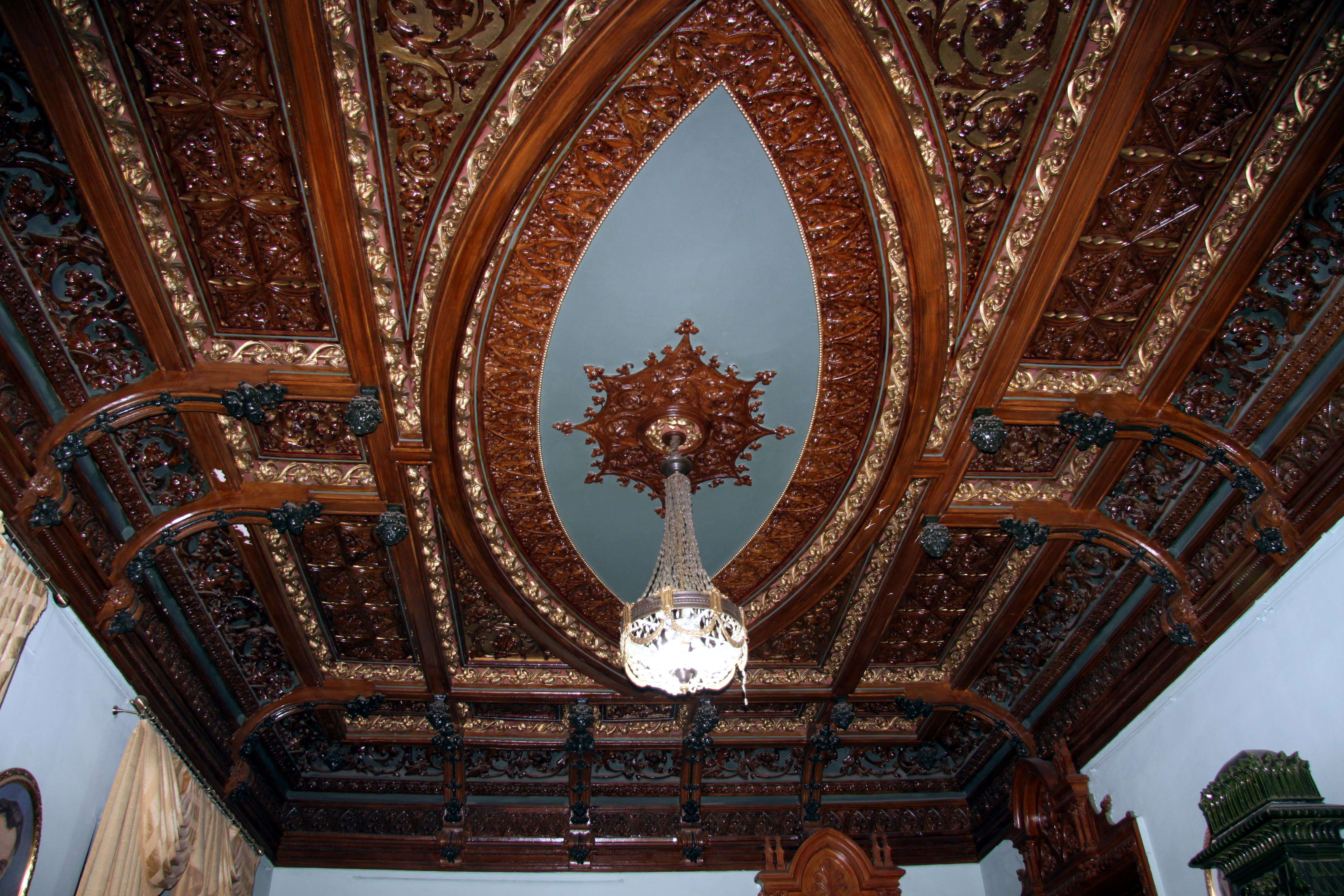 Особняк С. Лібермана, Банкова вул., 2, Київ